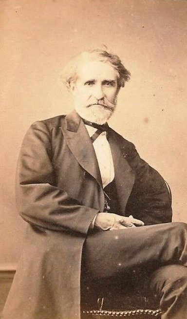 Portrait de Jules-Eugène Lenepveu par Louis Lebiez (1813-1894), photographe à Angers (vers 1880), document inédit.